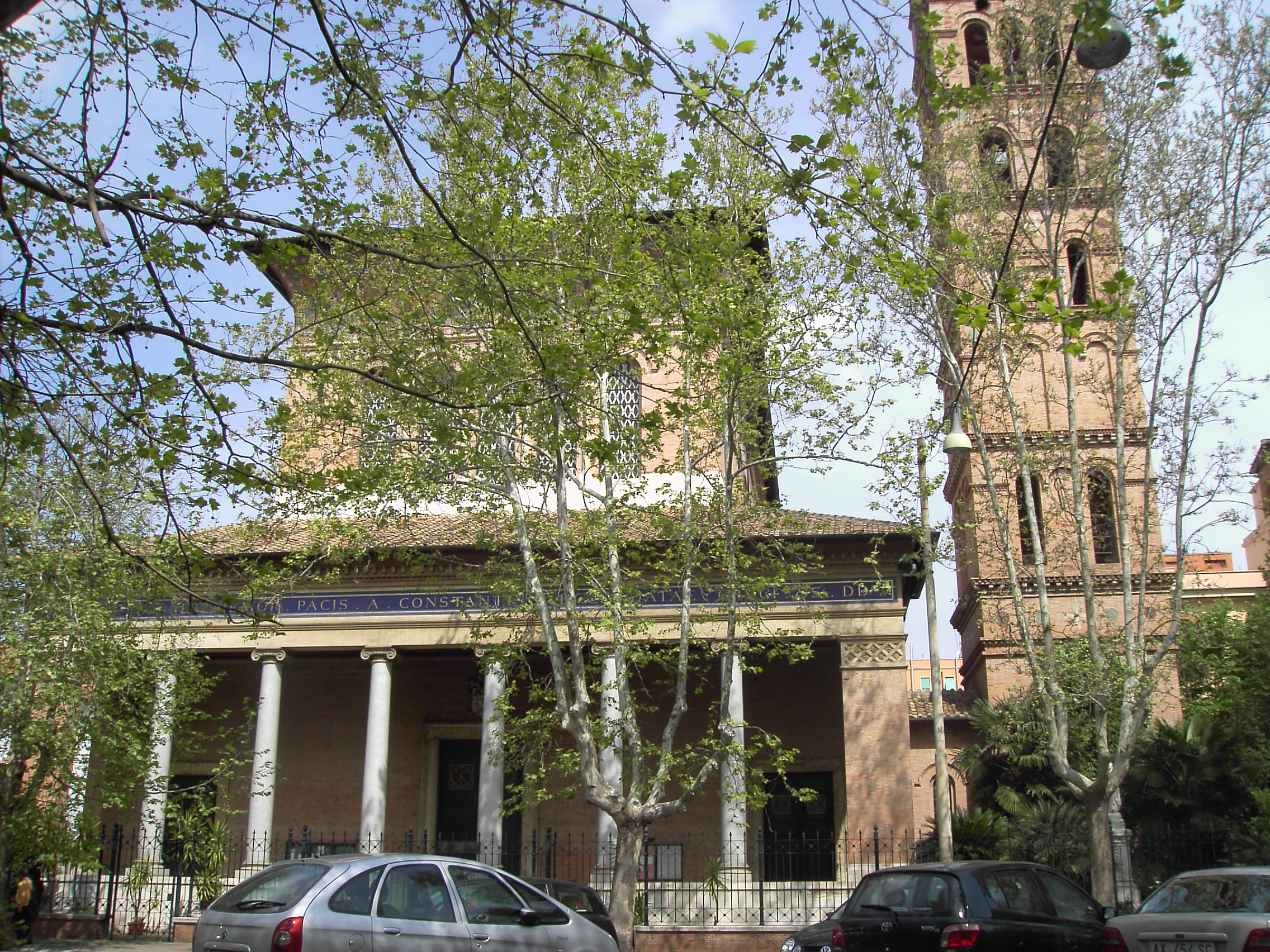 Roma, Santa Croce a via Flaminia (Aristide Leonori, 1913)